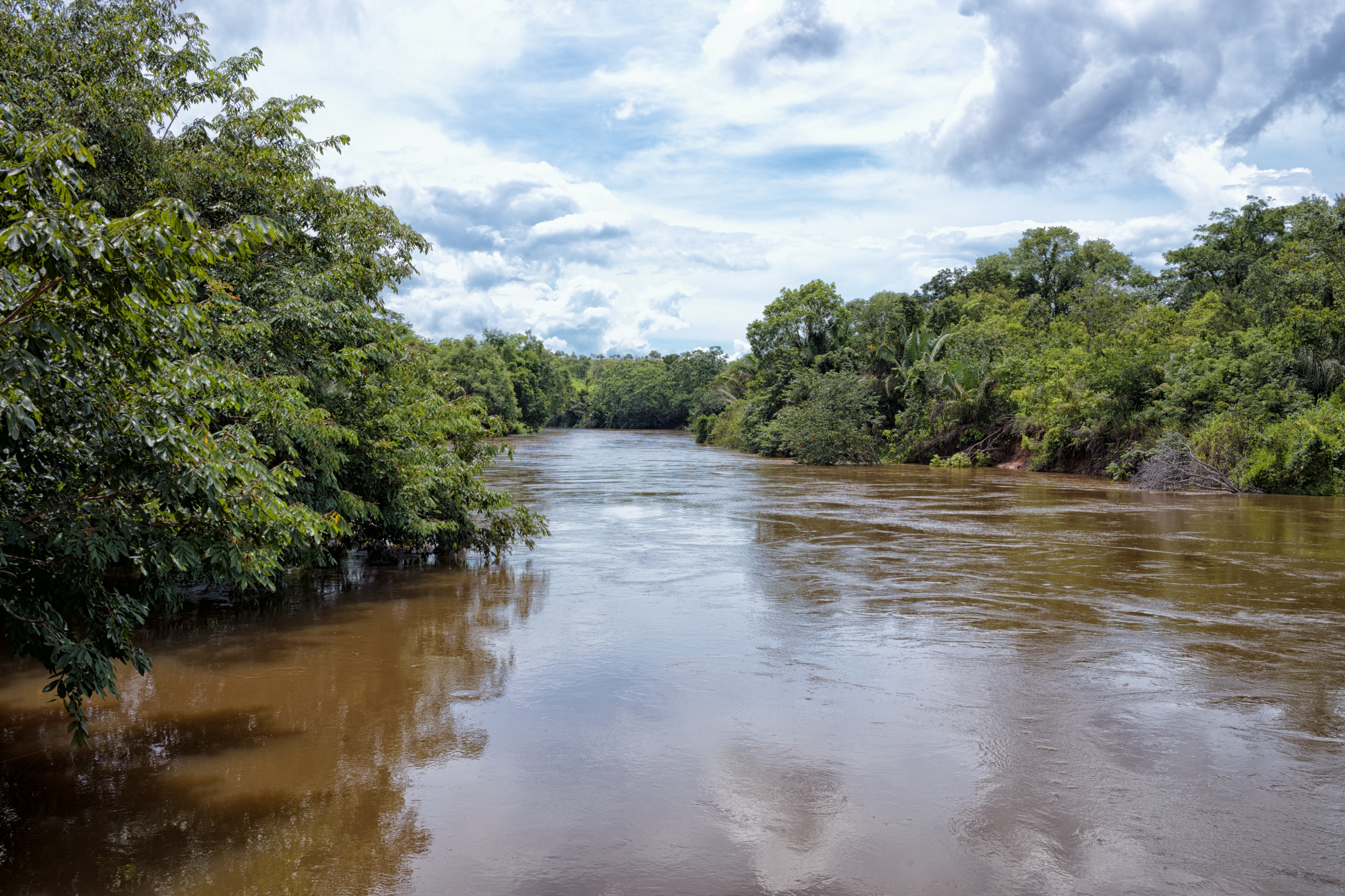 Balsas 2018-10